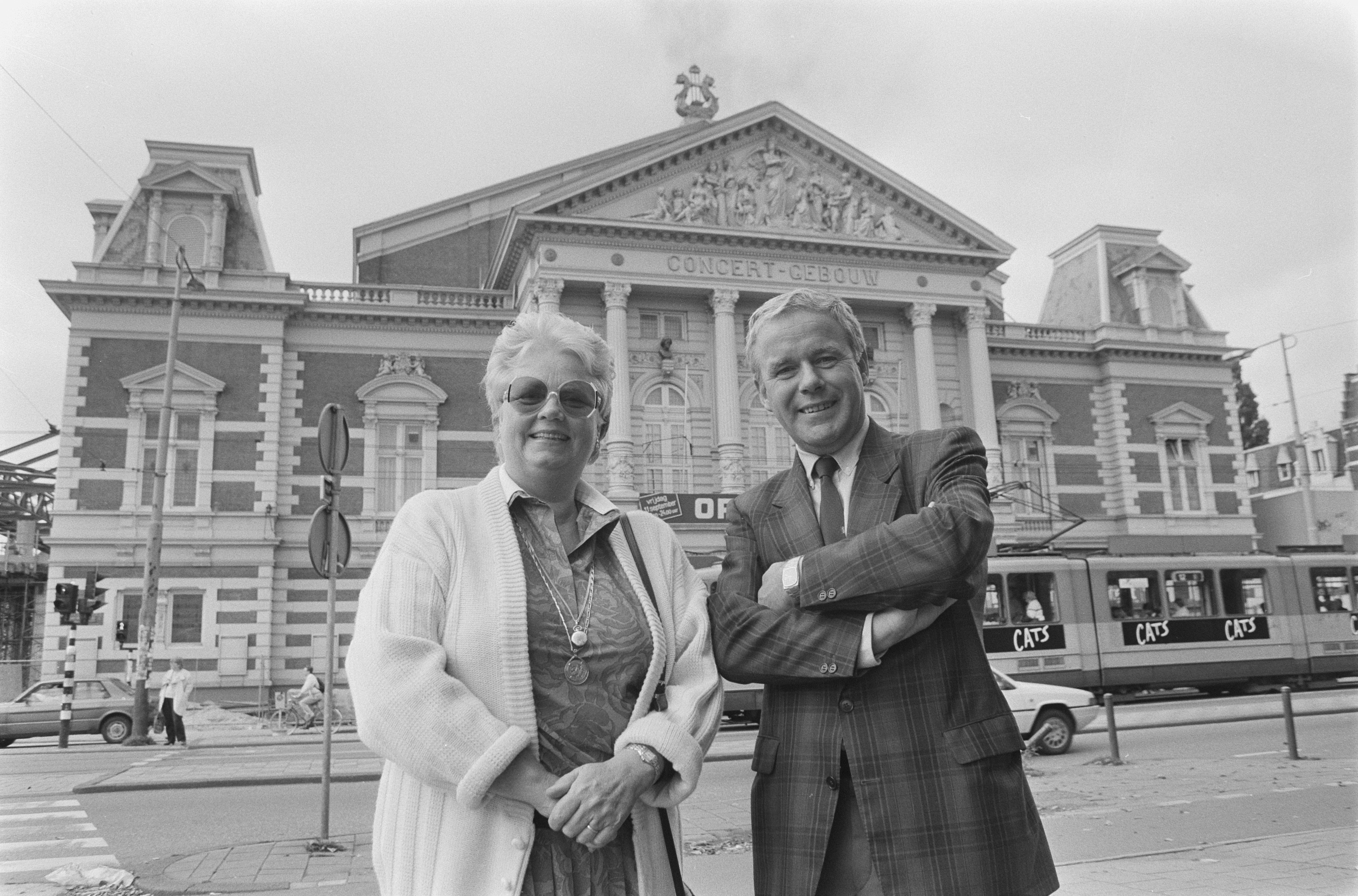 Collectie / Archief : Fotocollectie Anefo Reportage / Serie : [ onbekend ] Beschrijving : Persconferentie Stichting Christina Deutekom ; Christina Deutekom (l) en Peter Westerhoud voor Concertgebouw (opdracht Tubantia) Datum : 31 augustus 1987 Trefwoorden : CONCERTGEBOUWEN, persconferenties Persoonsnaam : Christina Deutekom, Westerhoud, Peter Instellingsnaam : Tubantia Fotograaf : Molendijk, Bart / Anefo Auteursrechthebbende : Nationaal Archief Materiaalsoort : Negatief (zwart/wit) Nummer archiefinventaris : bekijk toegang 2.24.01.05 Bestanddeelnummer : 934-0632